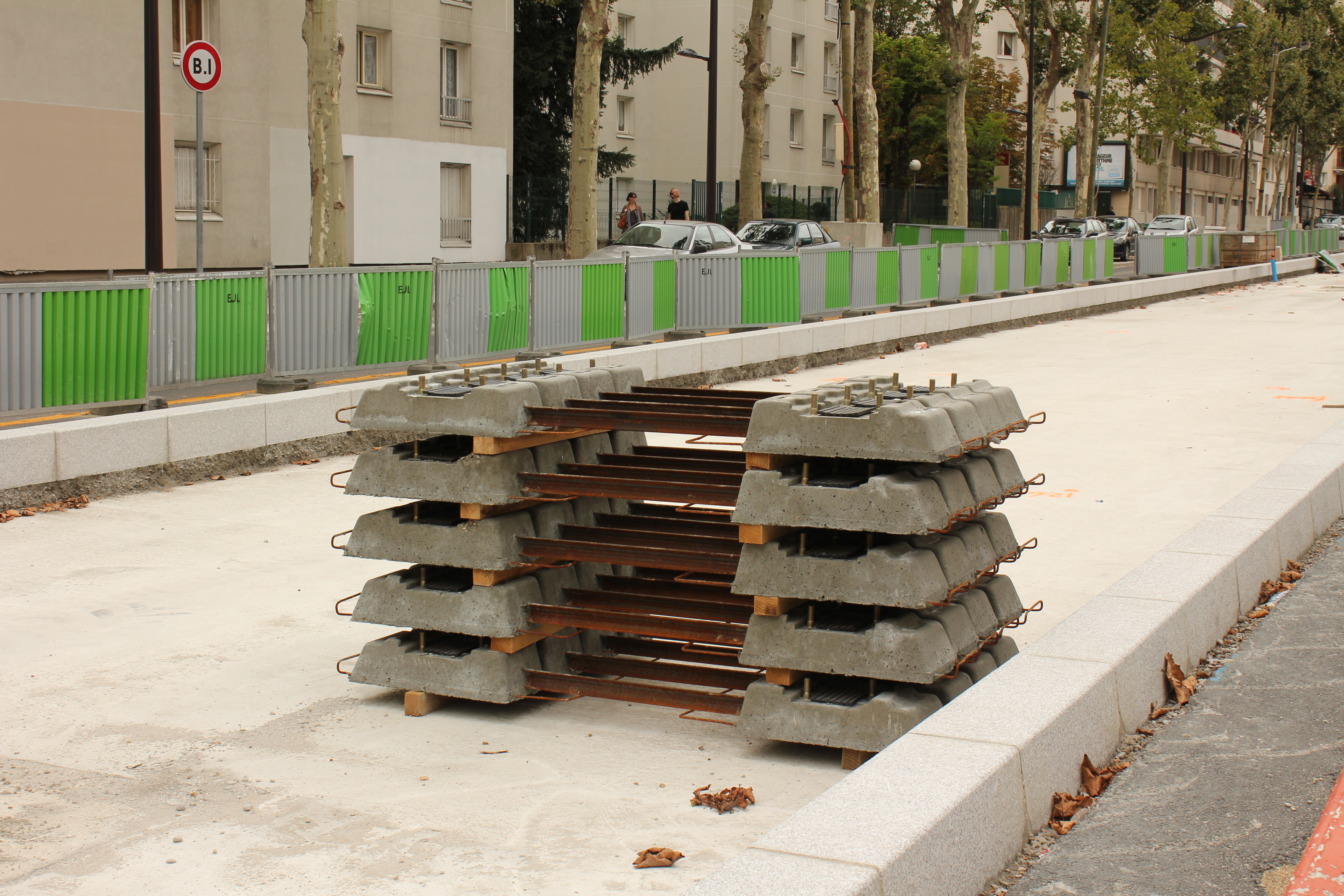 Traverses en béton pour les travaux du T3, dans le 20e arrondissement de Paris, France